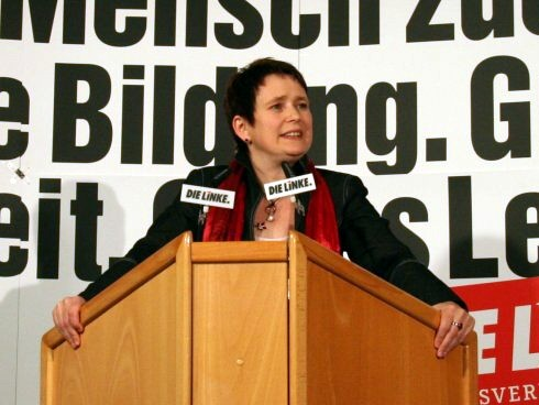 Kathrin Kagelmann